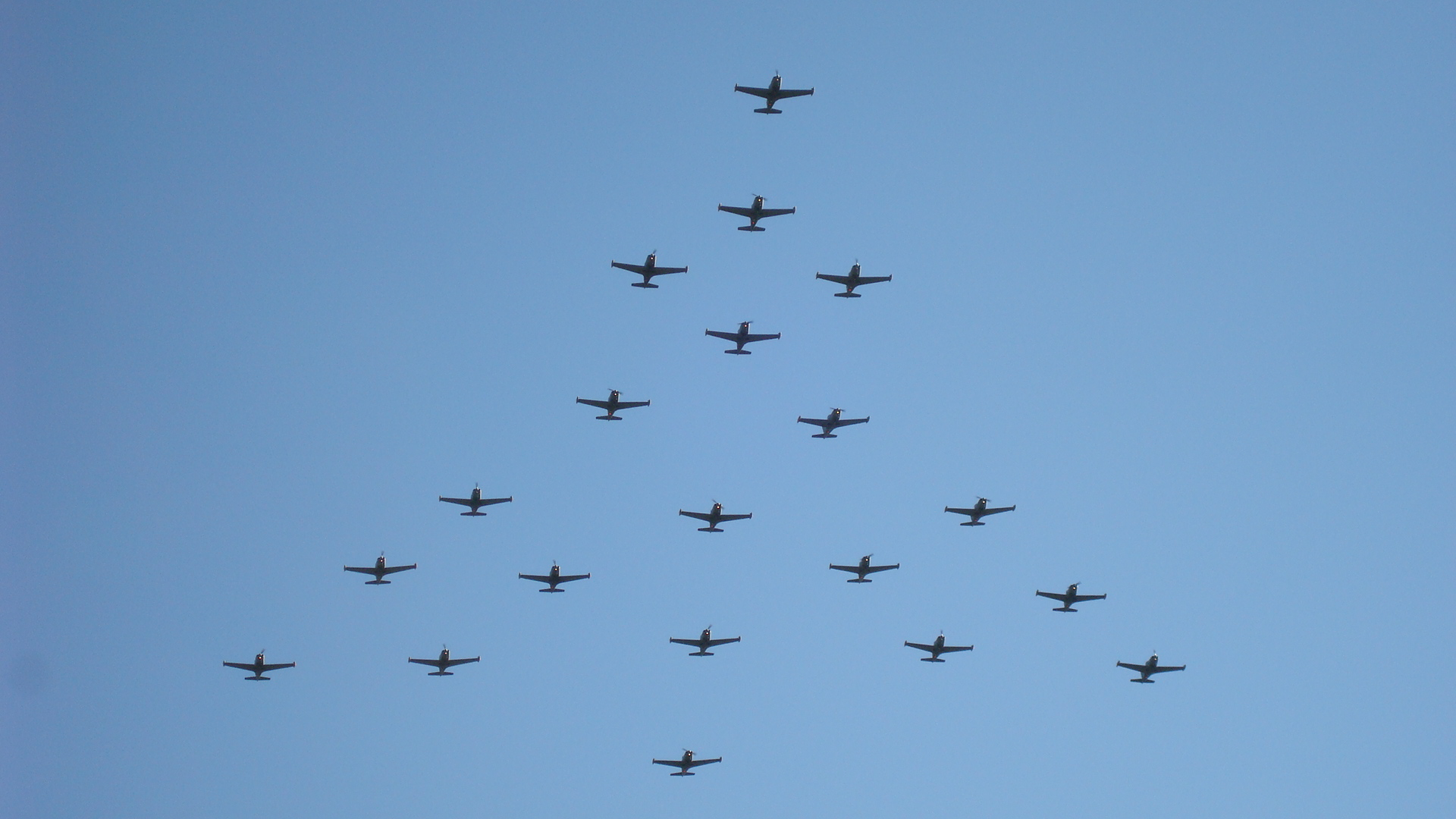 Formation of Aermacchi SF260EA - 70° Stormo - Italian Air Force Formazione di Aermacchi SF260EA - 70° Stormo - Aeronautica Militare